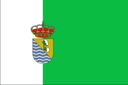 Guadalcacin bandera